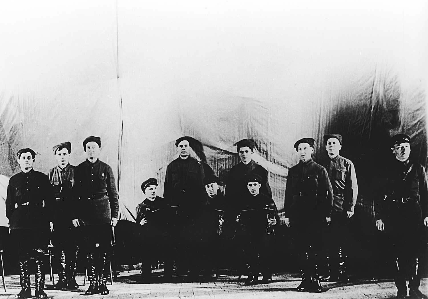 Первое выступление Ансамбля красноармейской песни Центрального дома Красной Армии имени М.В. Фрунзе 12 октября 1928 года в Центральном доме Красной Армии